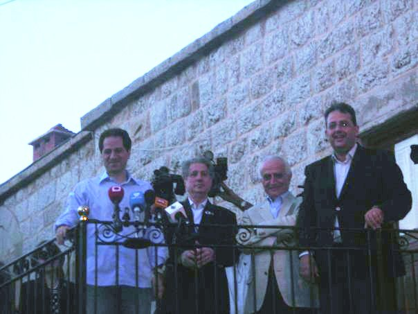 סאמי ג'מאייל ואמין ג'מאייל בבכפיא. צילום: כריסטיאן שאול / Christian Chaoul